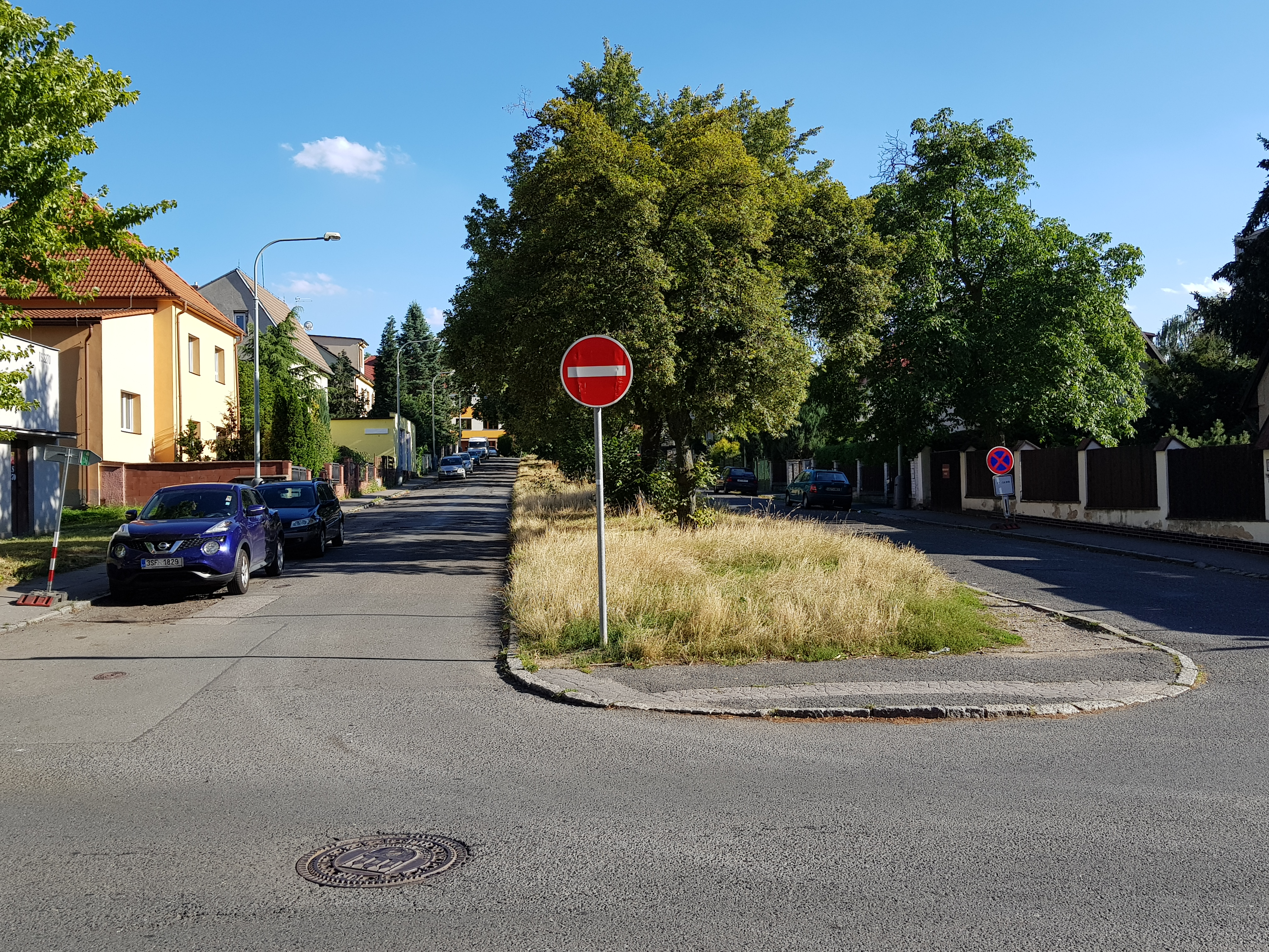 Čertouská ulice, Praha 14-Hloubětín, pohled od ulice Klánovické směrem na jih